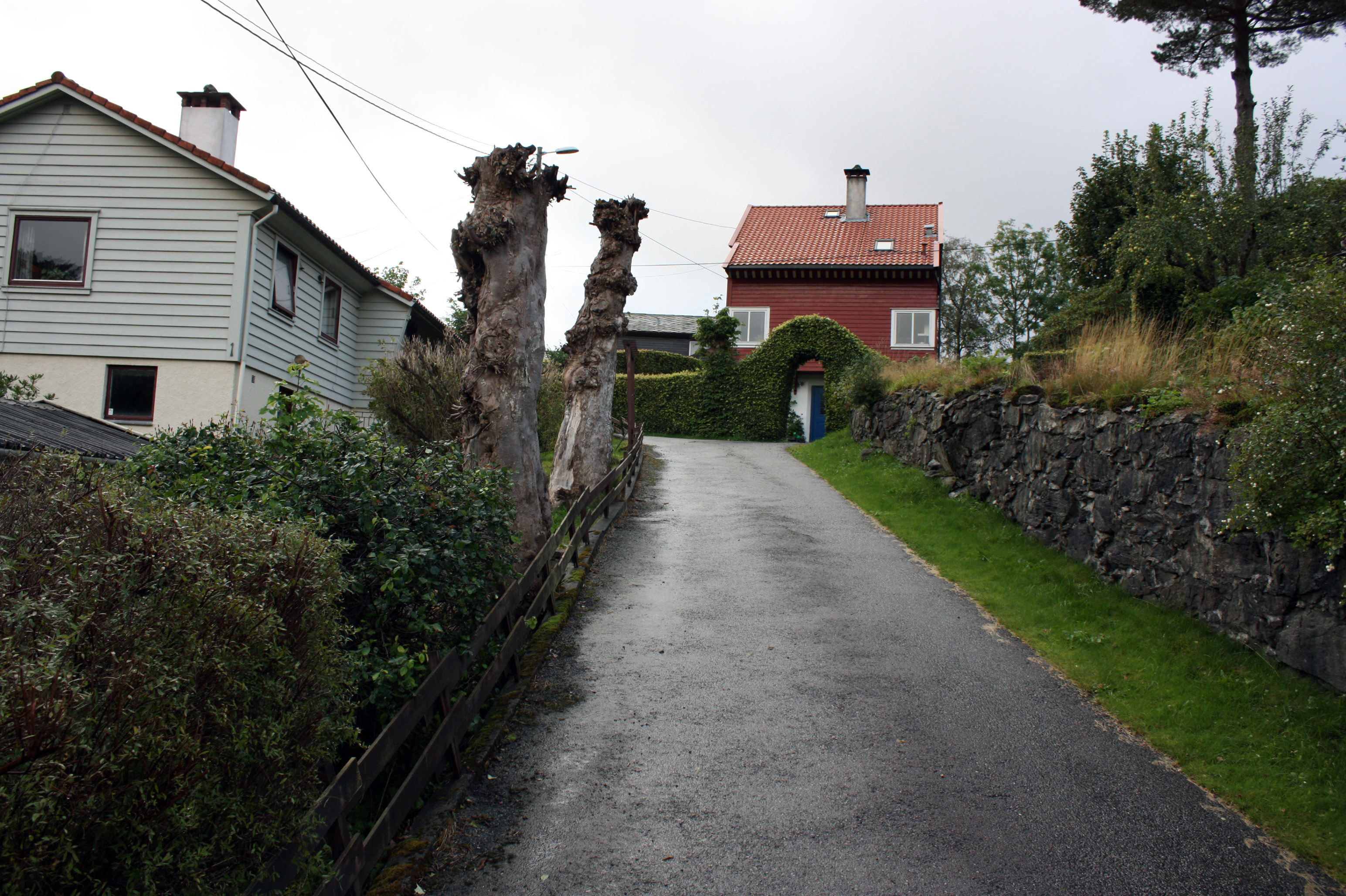 Nøysomheten, Fana, Bergen.